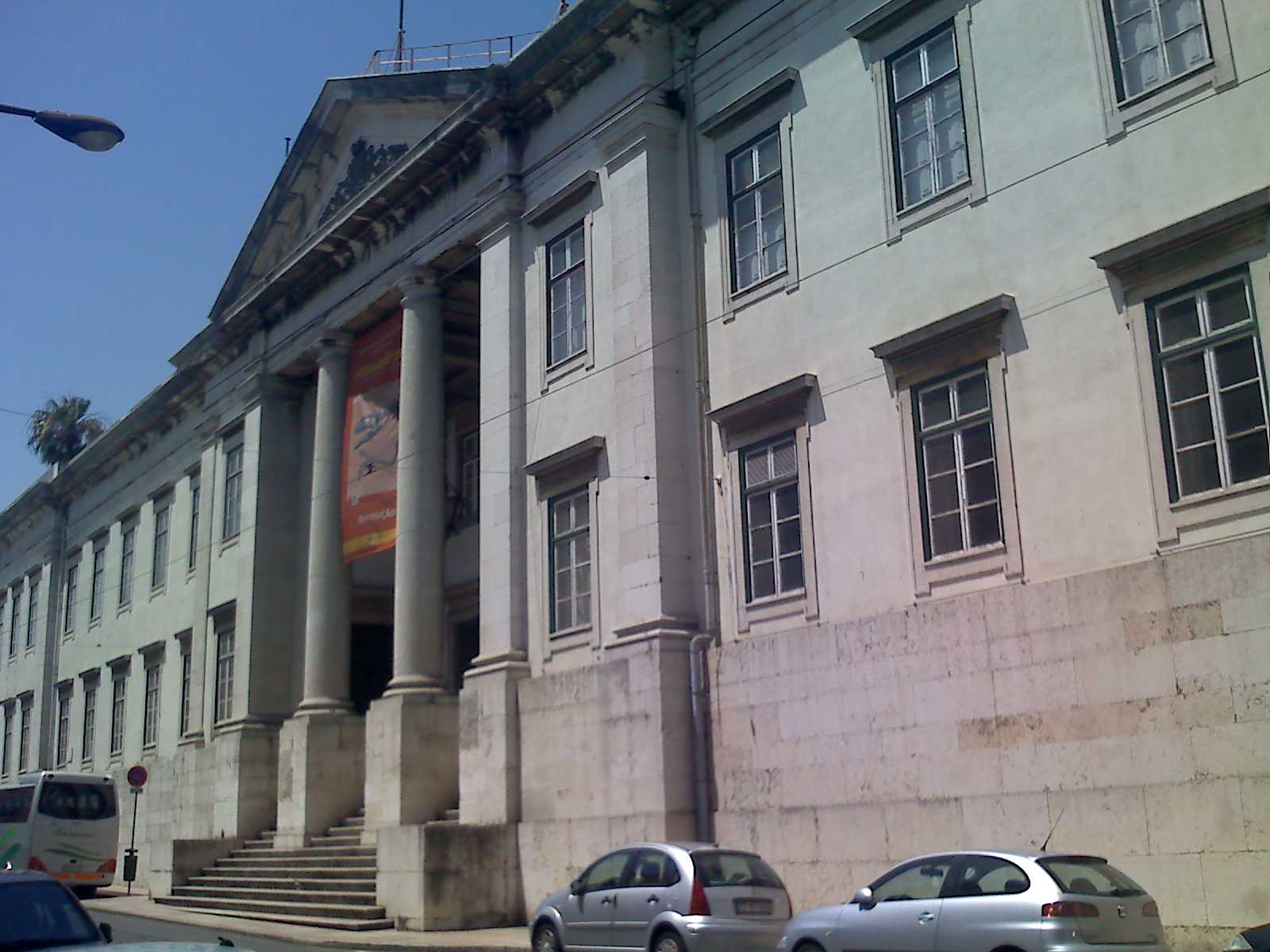 Antiga Escola Politécnica de Lisboa. Atual Museu de História Natural e Faculdade de Ciências da Universidade de Lisboa